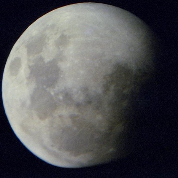 Eclipse Lunar Total del 21.01.2000. Aproximadamente a las 00:20 hs. (hora local argentina). Visto en toda América, NW de África, E-NE-N de Europa.